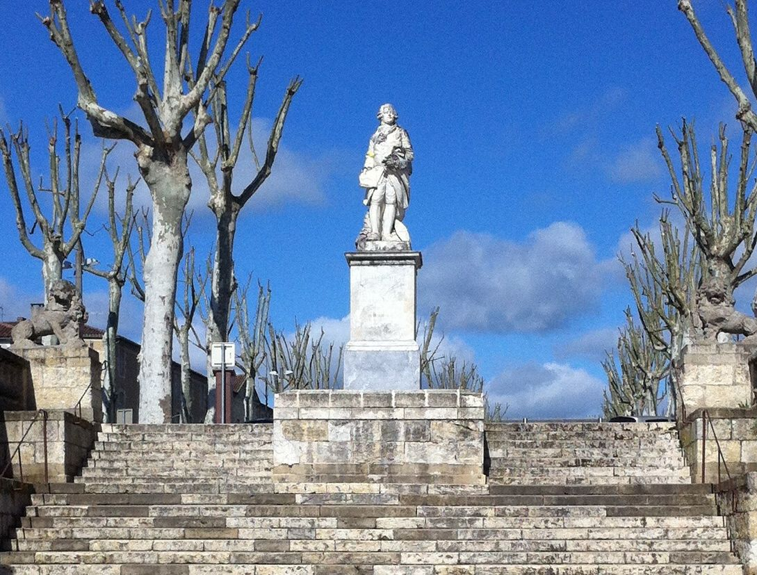 Auch (Gers, France) - Statue de l'intendant Antoine Mégret d'Etigny.